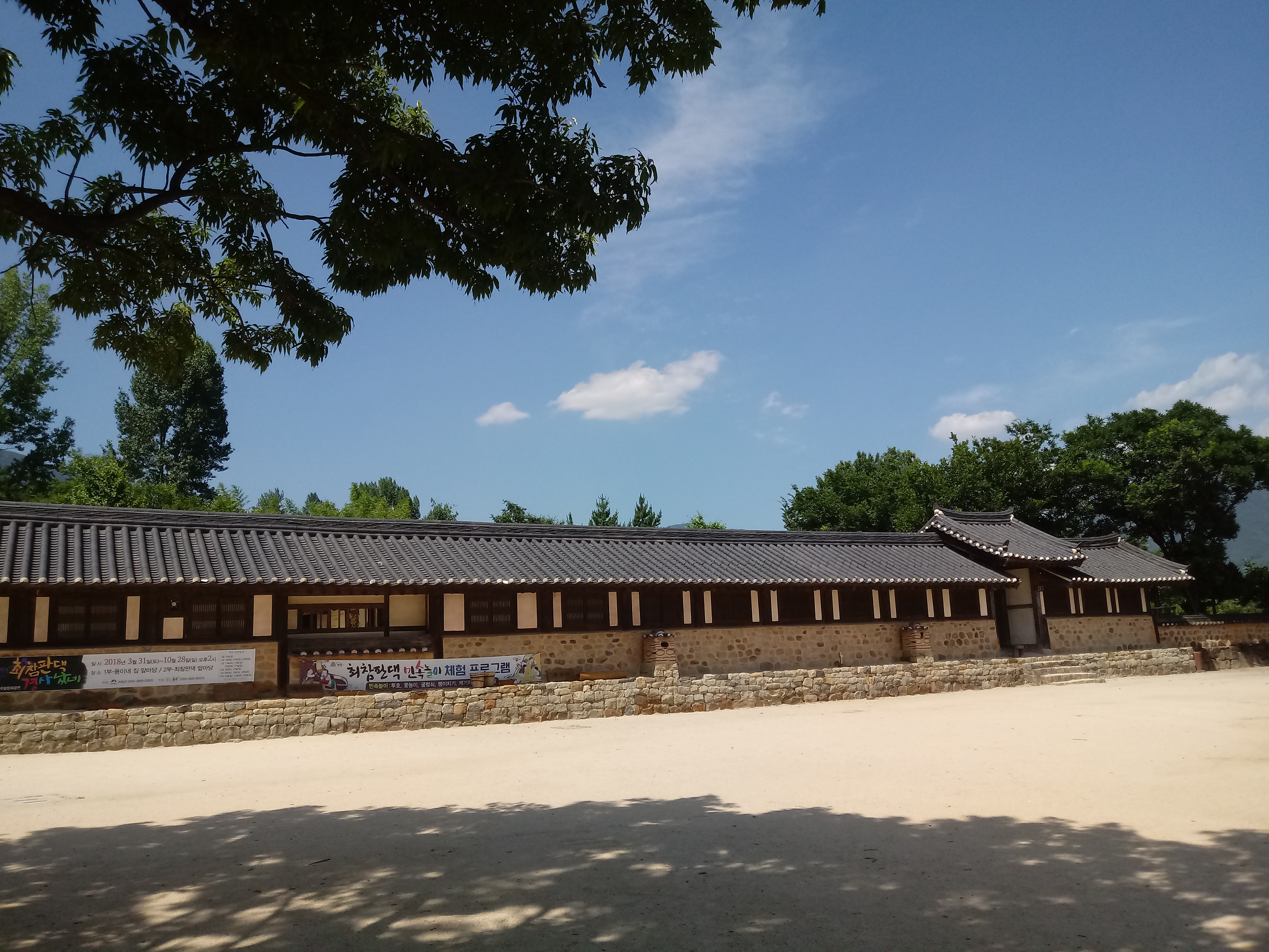 최참판댁 전면